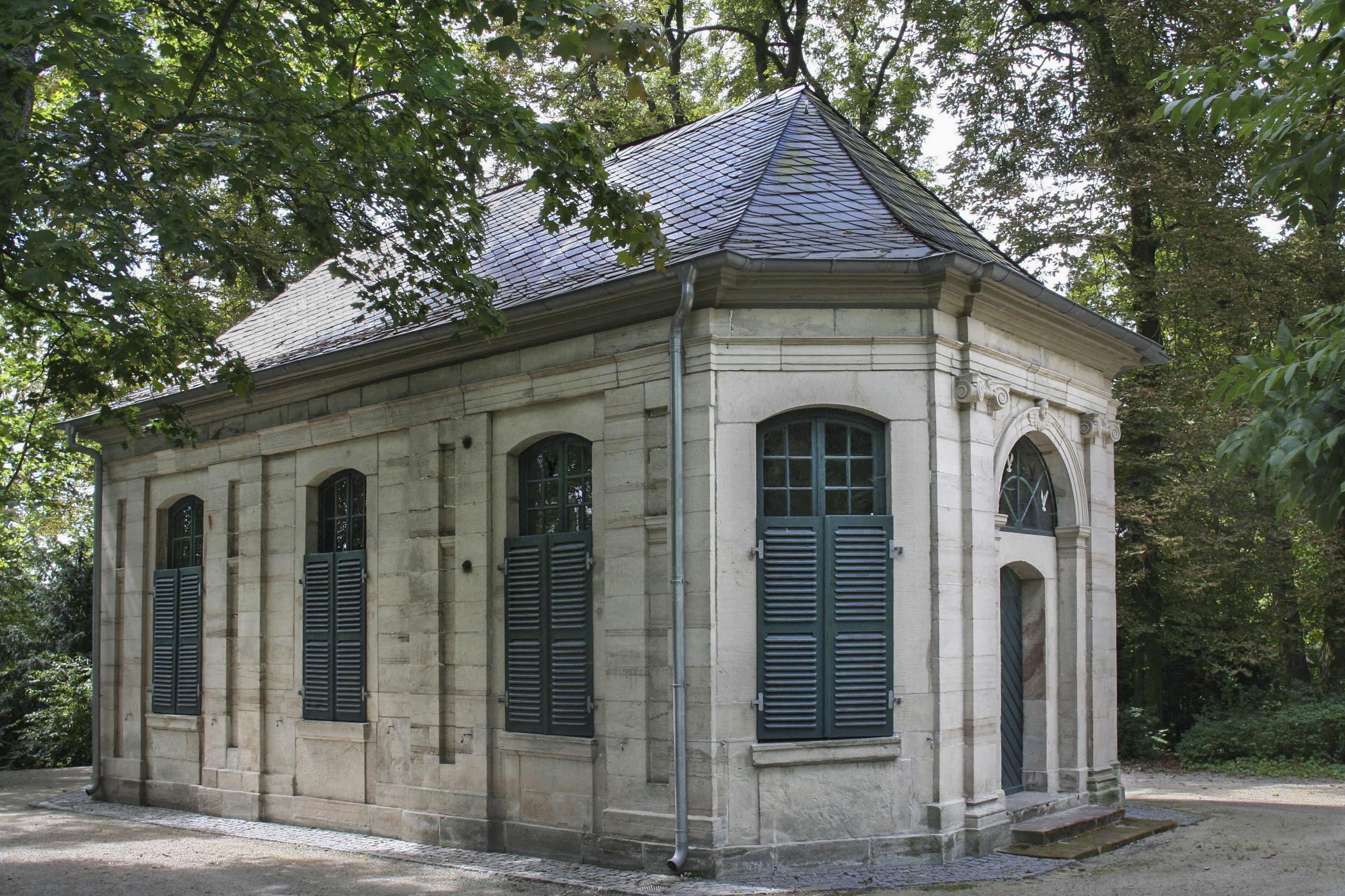 Östlicher Gartenpavillon im Coburger Hofgarten